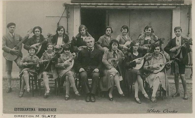 L'ensemble musical de Hendaye L'Estudiantina hendayaise, au nom dérivé des estudiantinas espagnoles.